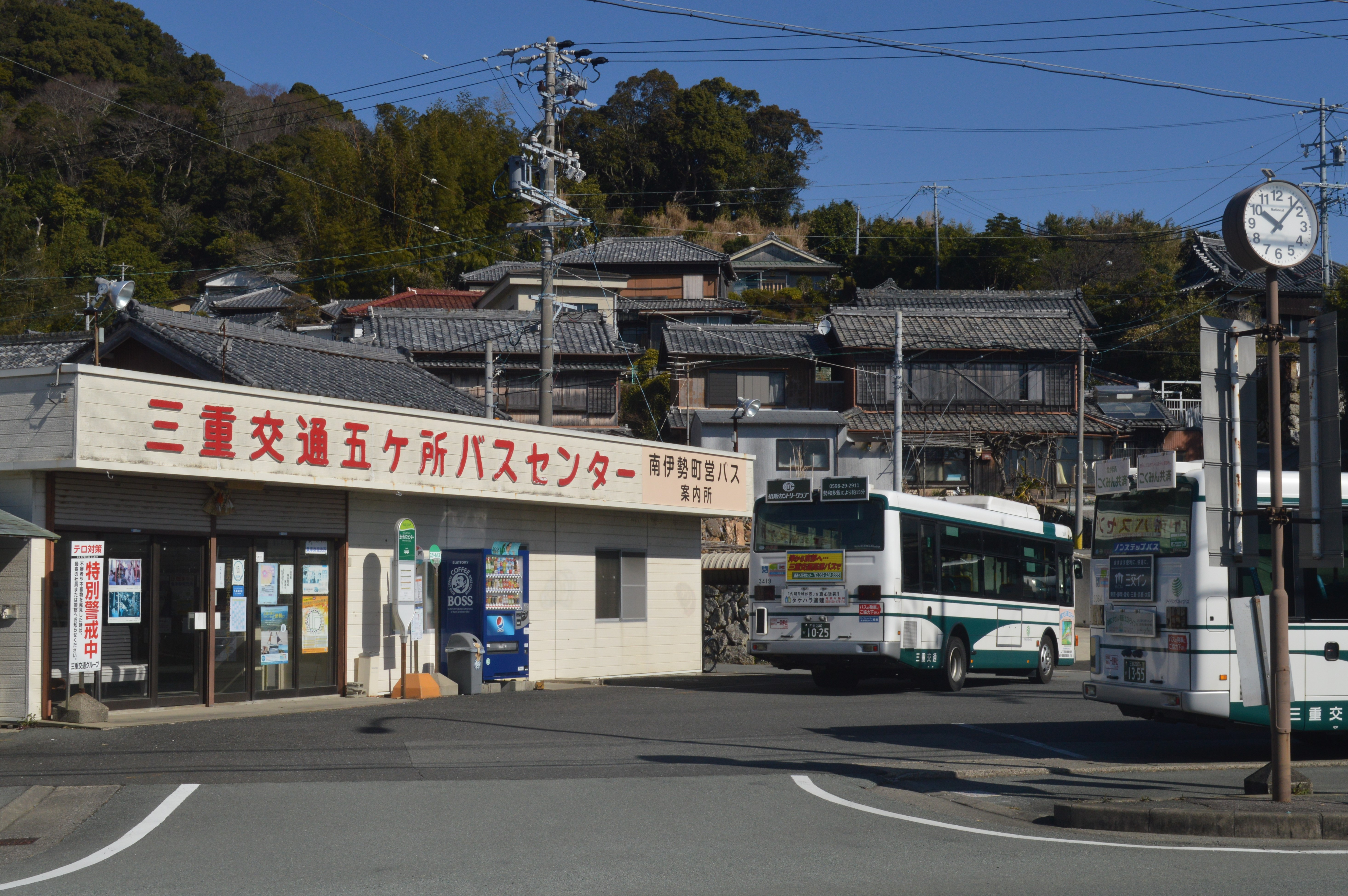 三重県度会郡南伊勢町五ヶ所浦にある三重交通五ヶ所バスセンター。